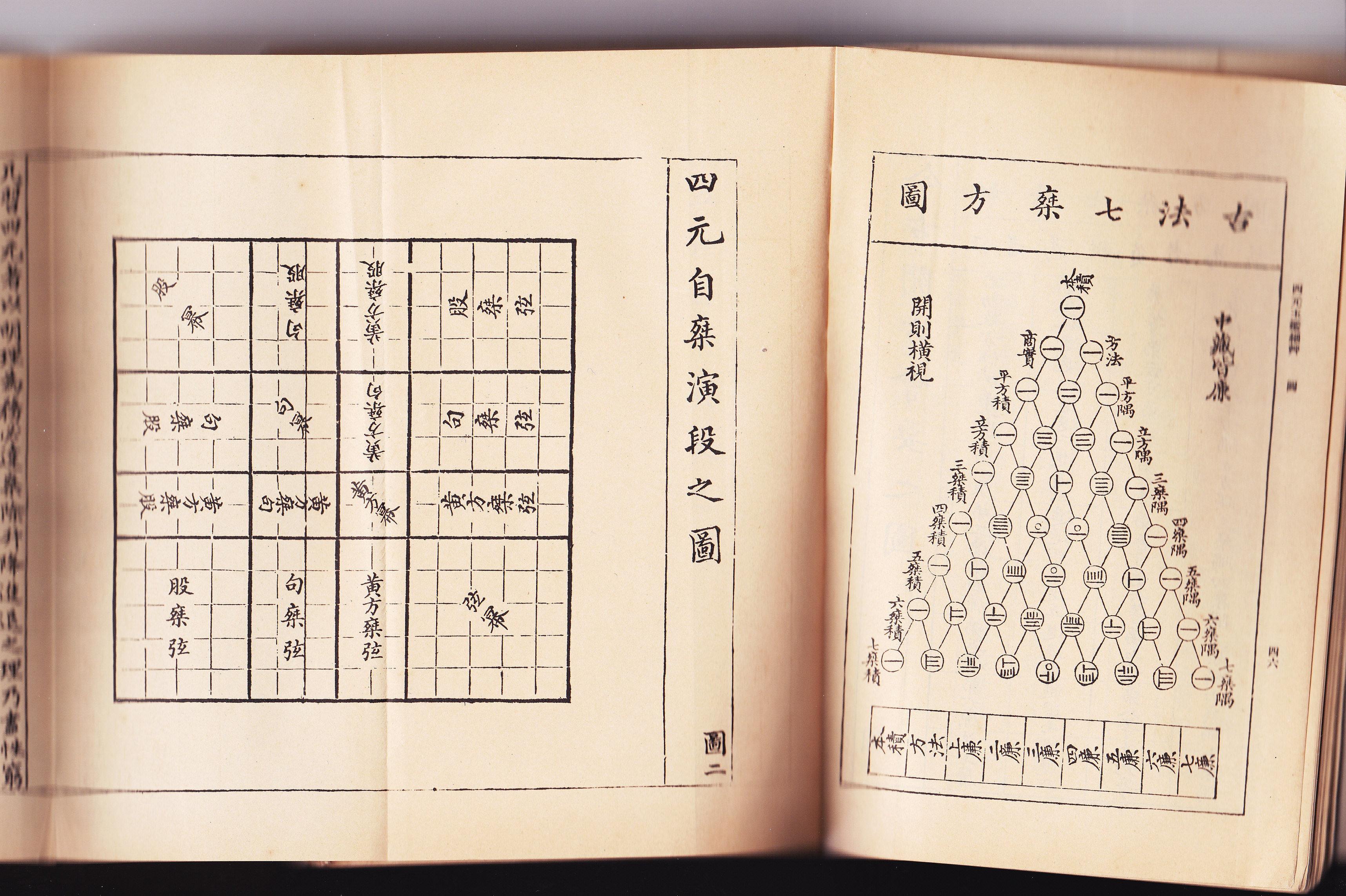 四元自乘演段图